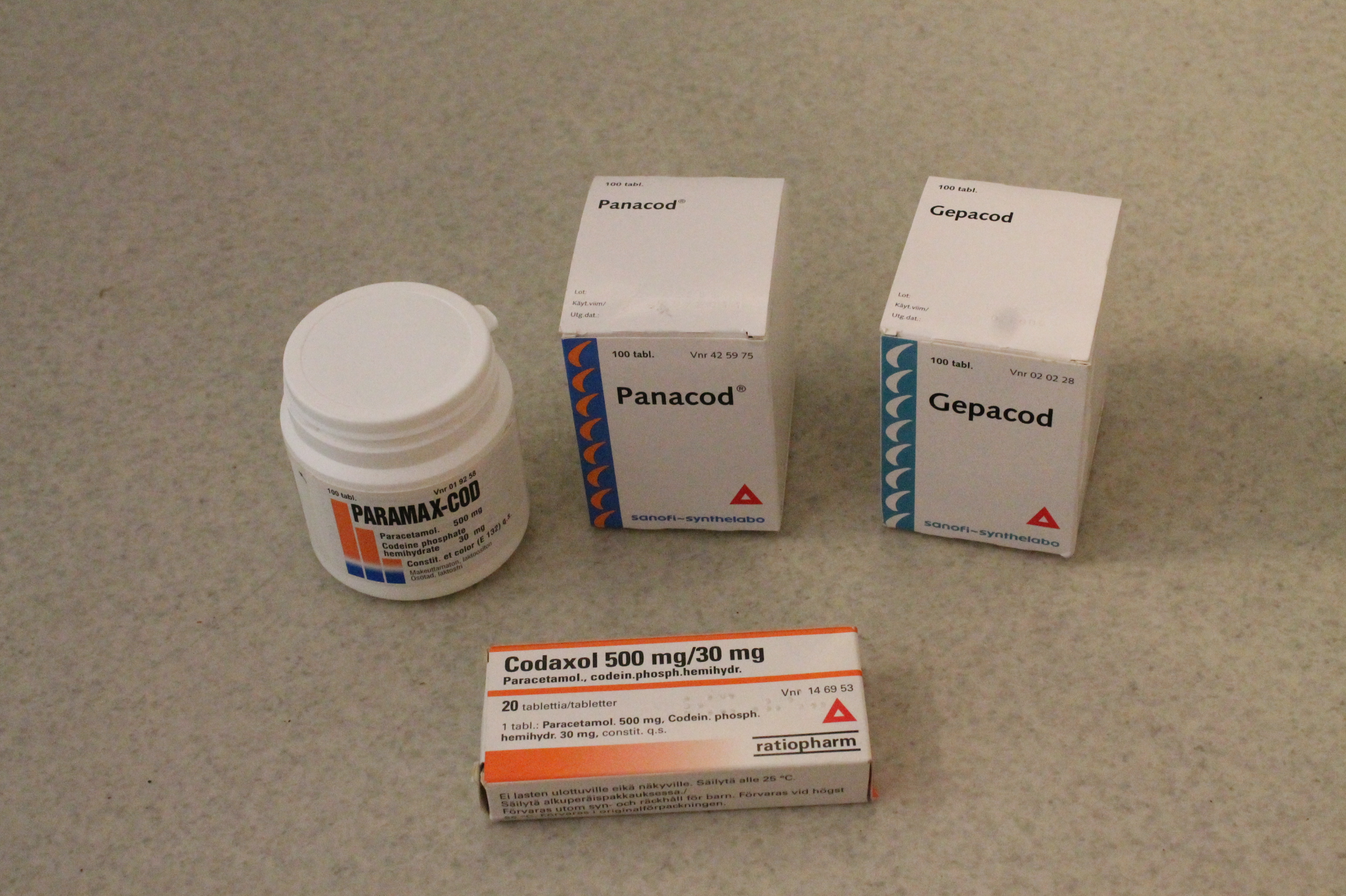 Co-codamol -lääkepakkauksia